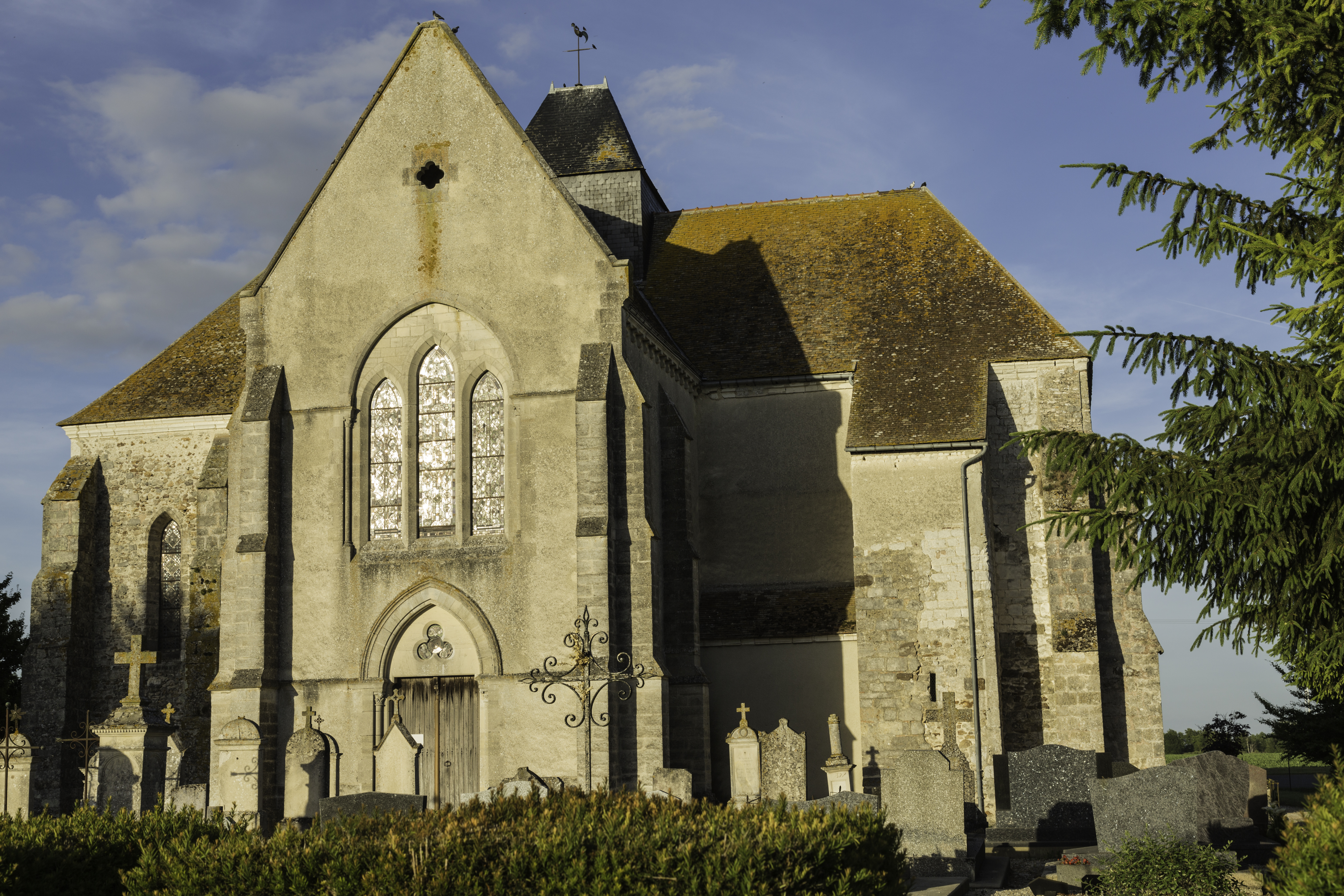 Église Saint-Pierre de La Chapelle-Lasson .